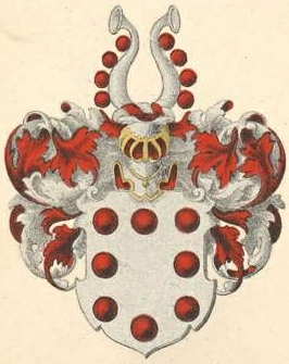 Stael von Holsteini aadli- ja parunivapp